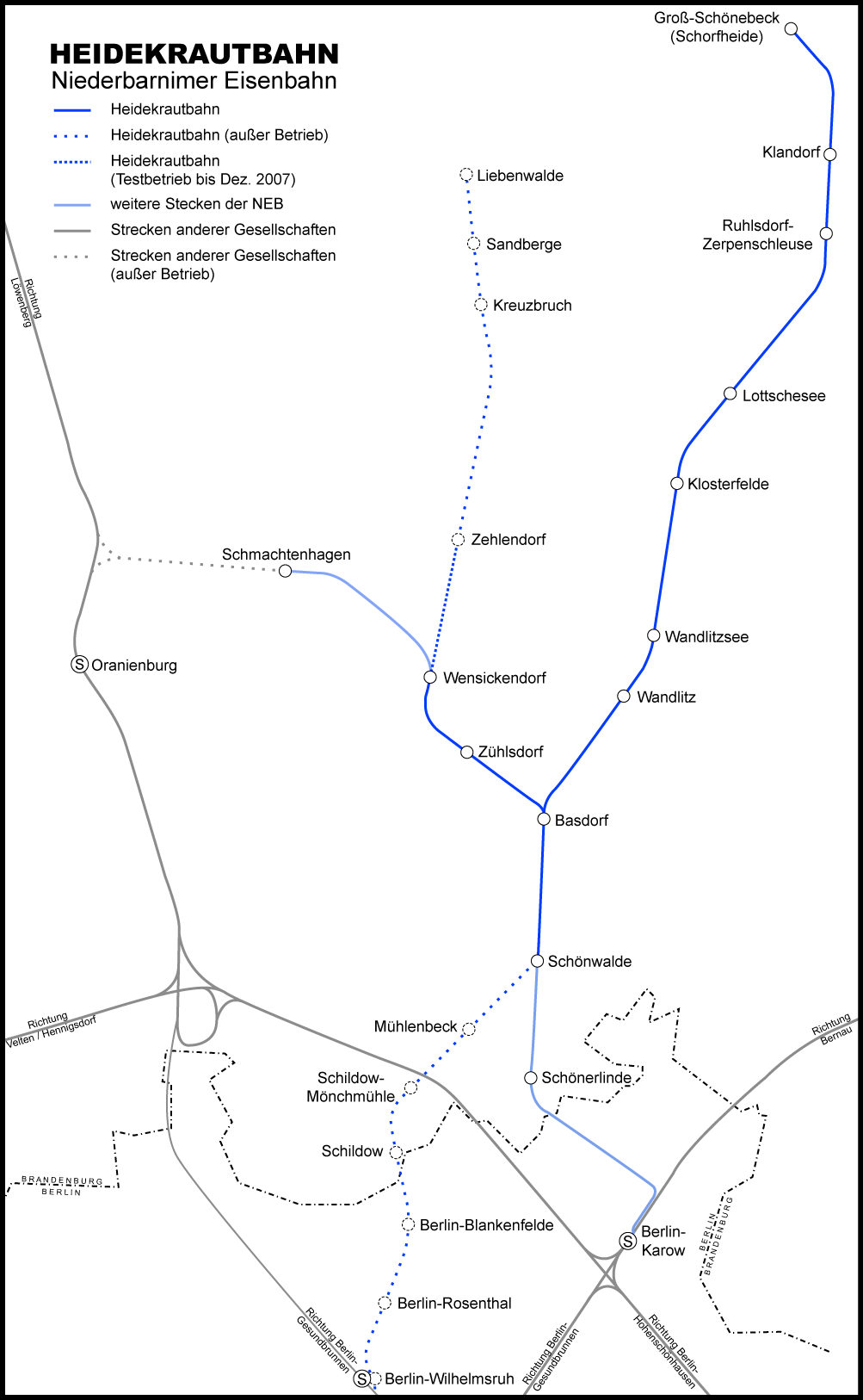 Karte des Streckenverlaufs der Heidekrautbahn